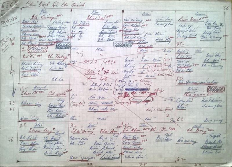 Hồ Chí Minh2